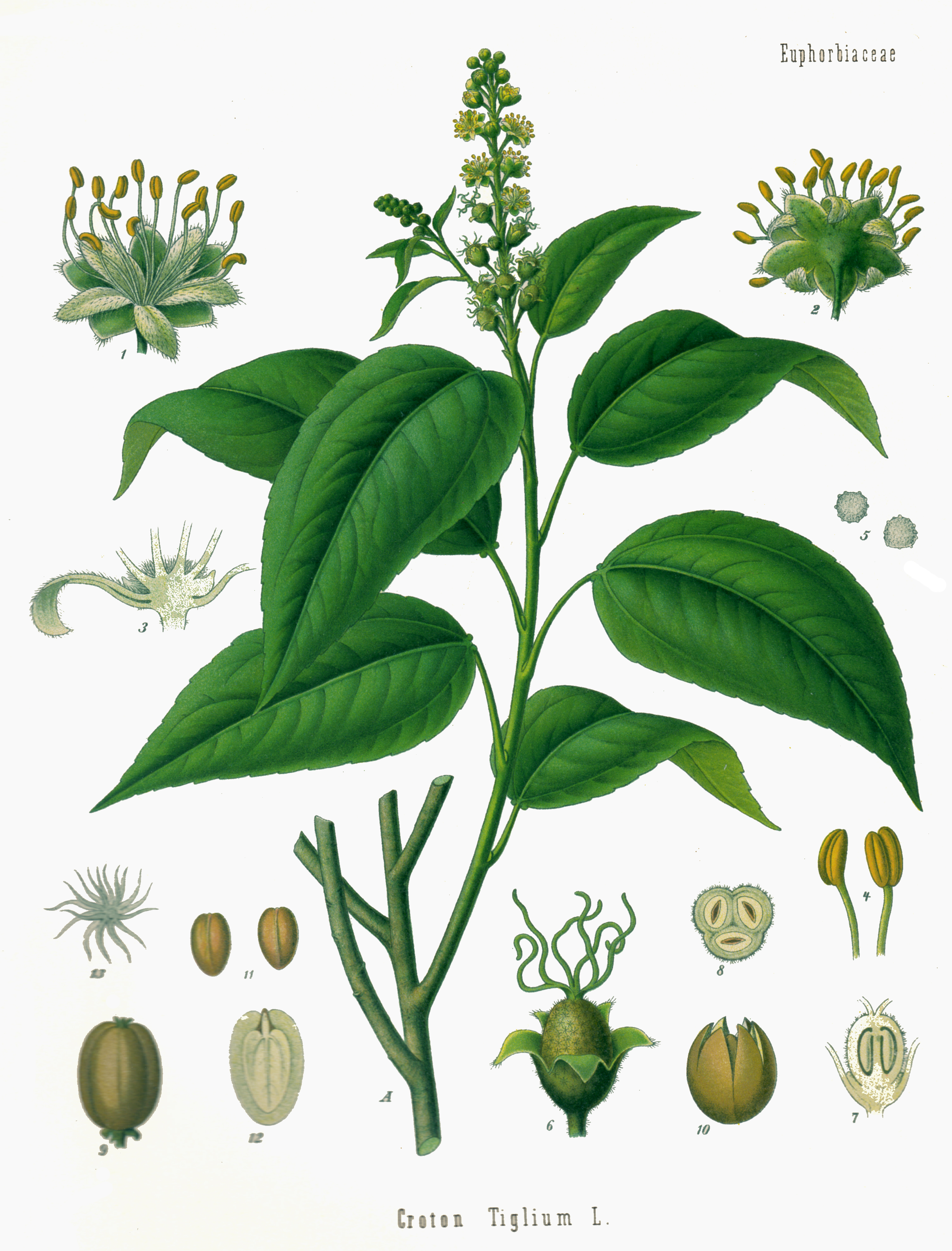 Abbildung von Croton tiglium